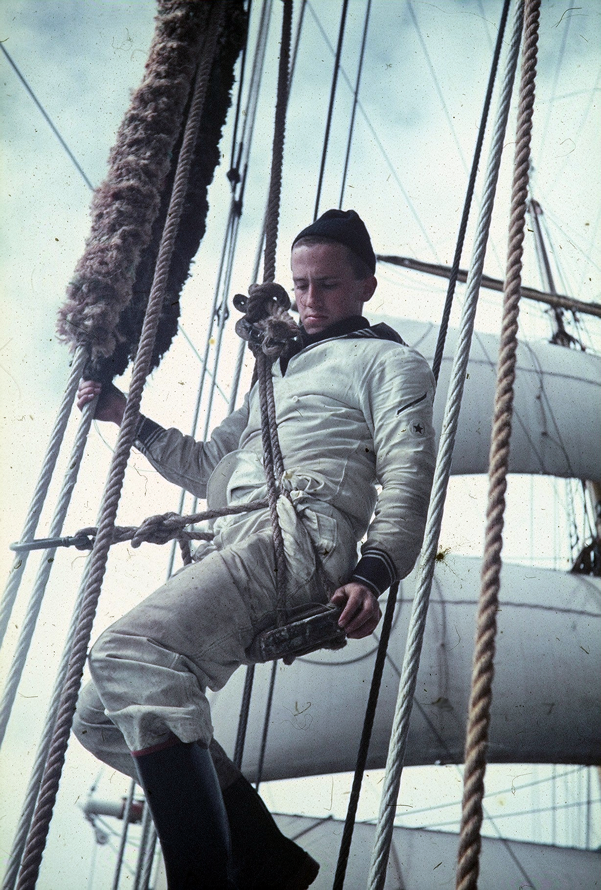 Fotografie von der Auswechslung eines Tausendbeins im Vortopp der Gorch Fock (1958)